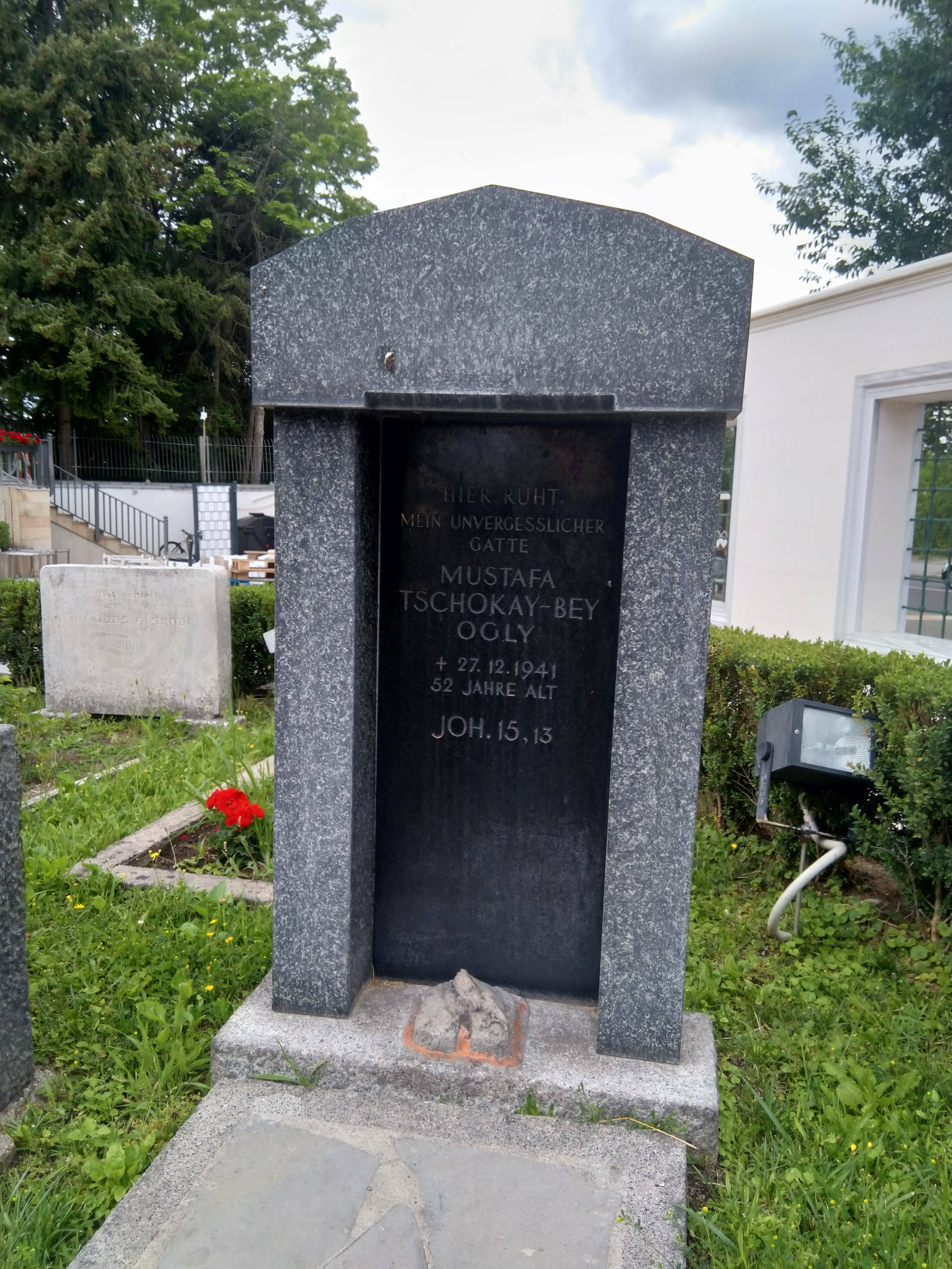 Мустафа Шокай